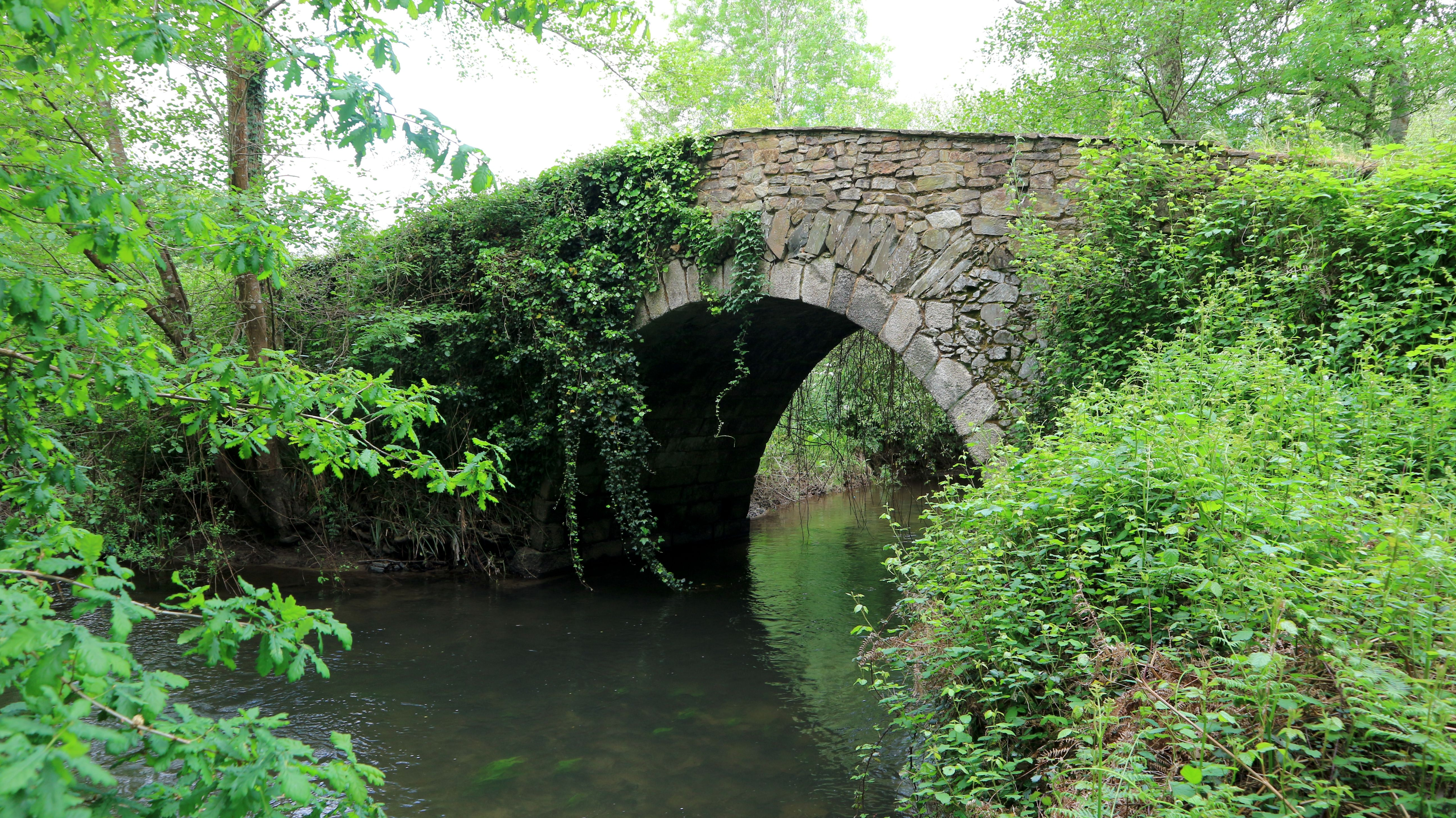 Ponte de Beldoña, que dá o paso de Beldoña (Mabegondo) a Guiliade (Piadela, Betanzos).